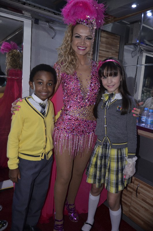 O atores Jean Paulo Campos e Larissa Manoela, e a apresentadora Eliana.